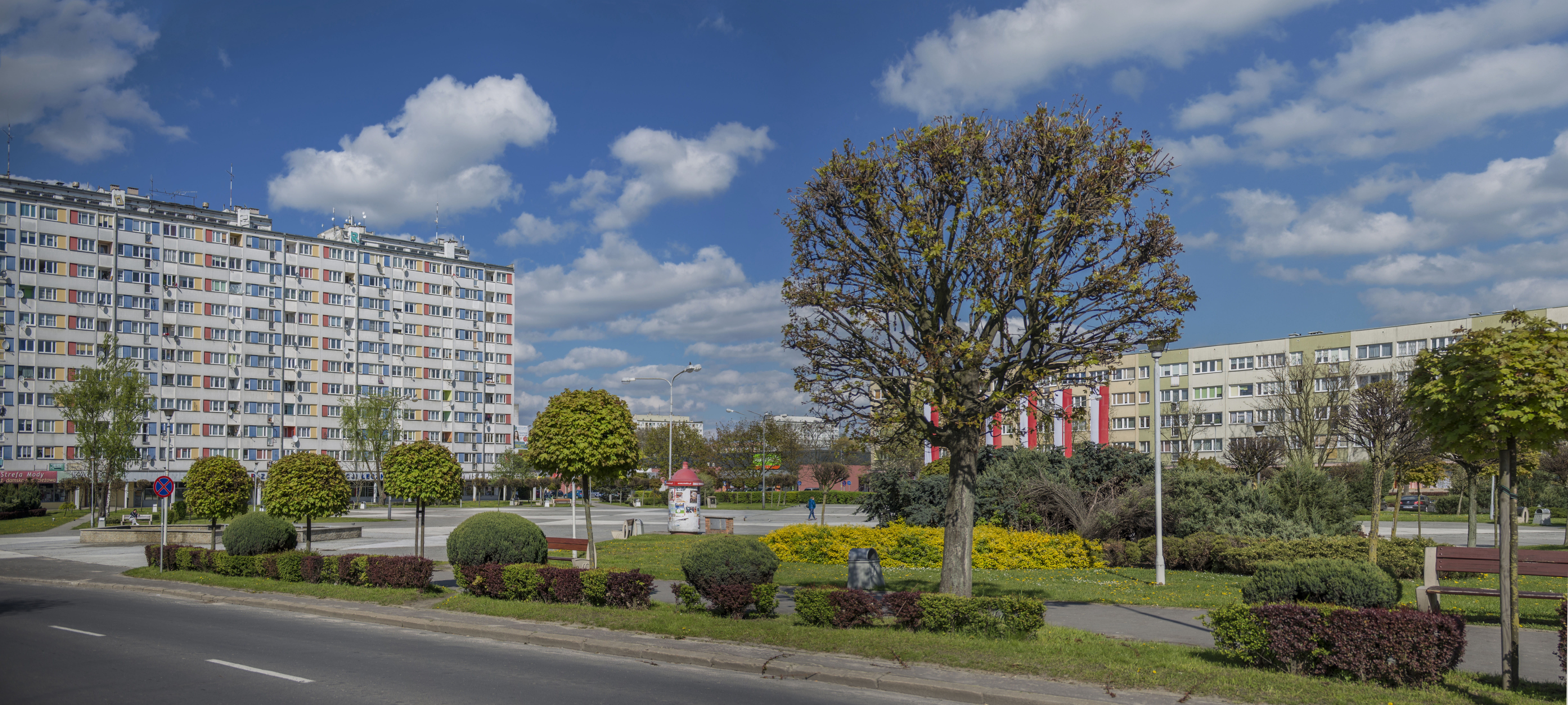 Plac Zwycięstwa